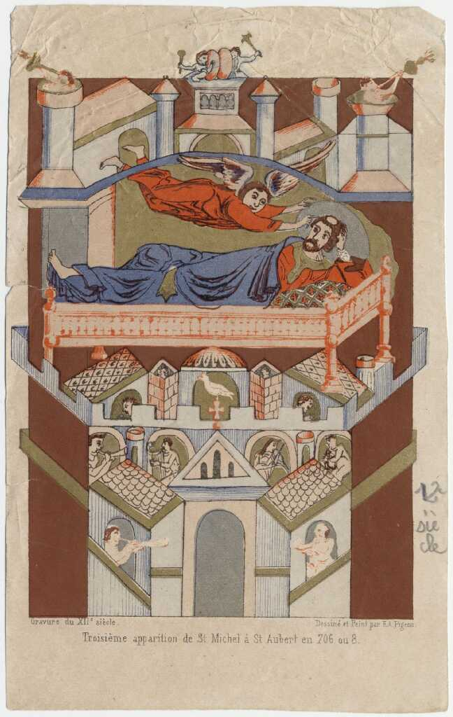 Troisième apparition de saint Michel à saint Aubert en 706, chromolithographie d’après une gravure du XIIe siècle, extraite d’E.-A. Pigeon, Description historique et monumentale du Mont Saint-Michel, Avranches, H. Tribouillard, 1865. Archives départementales de la Manche (cl. A. Poirier, 2 Fi 5/1)